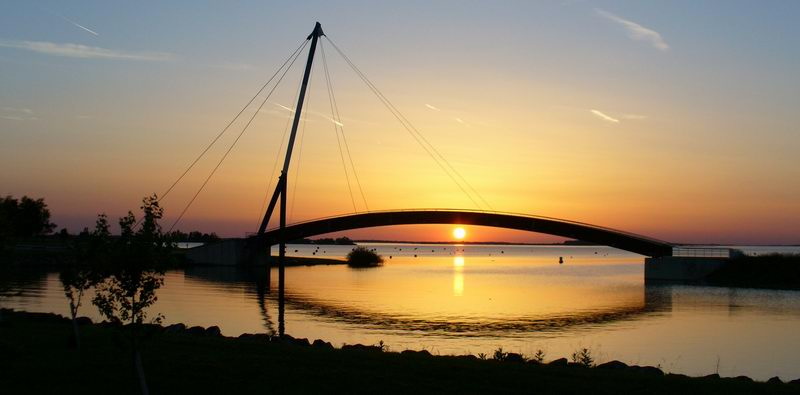 Lac du Der / France Hafen Giffaumont